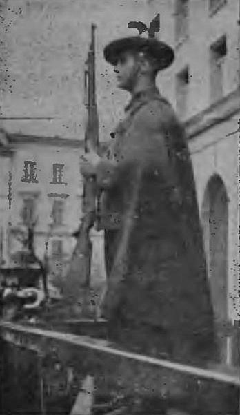 Strzelec 49 Huculskiego Pułku Strzelców, 1938